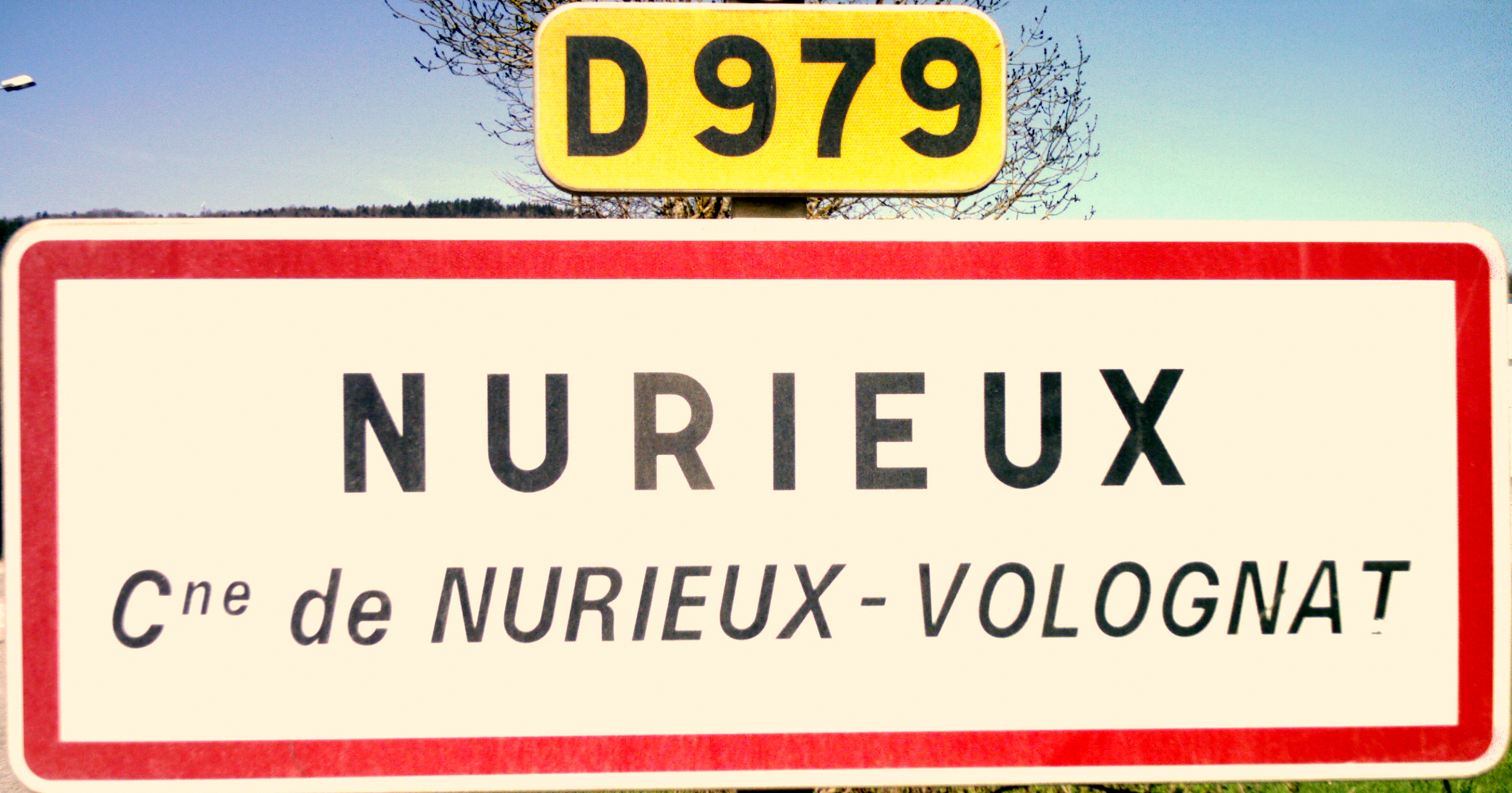 panneau d'entrée d'agglomération de la commune de Nurieux-Volognat